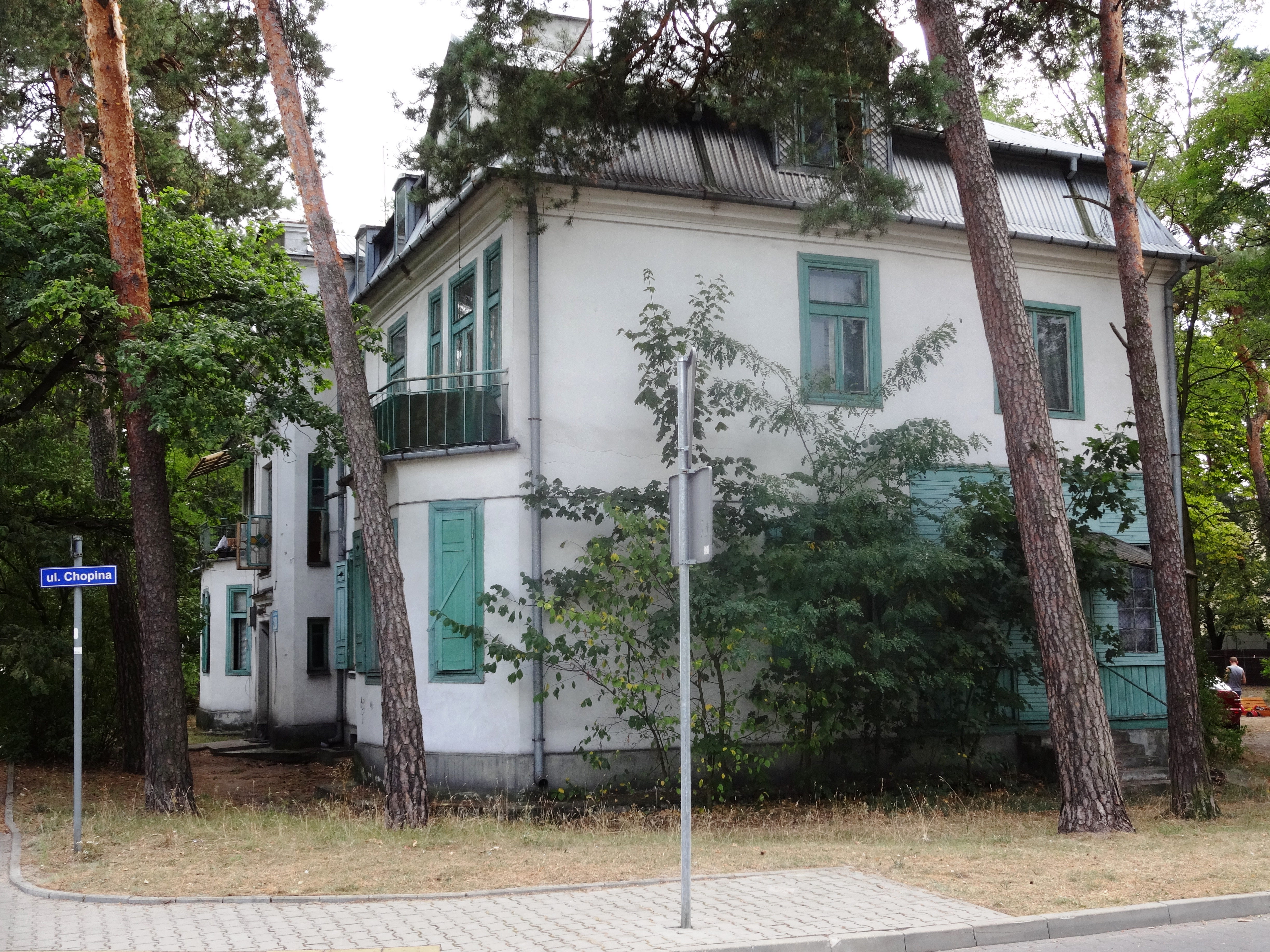 Dom przy ulicy Kościuszki 20, w którym mieszkał 15-letni Sławek Lewiński, który nocą z 12 na 13 IV 1941 r. obrzucił kamieniami i uszkodził godło hitlerowskie przed murowanym budynkiem przy ul. Kościuszki 18, gdzie mieszkał komendant Otwocka, zbrodniarz wojenny Walter Schlicht. Potem Niemcy wysadzili w powietrze pomnik Kościuszki, a chłopiec i jego ojciec zginęli w obozie koncentracyjnym.